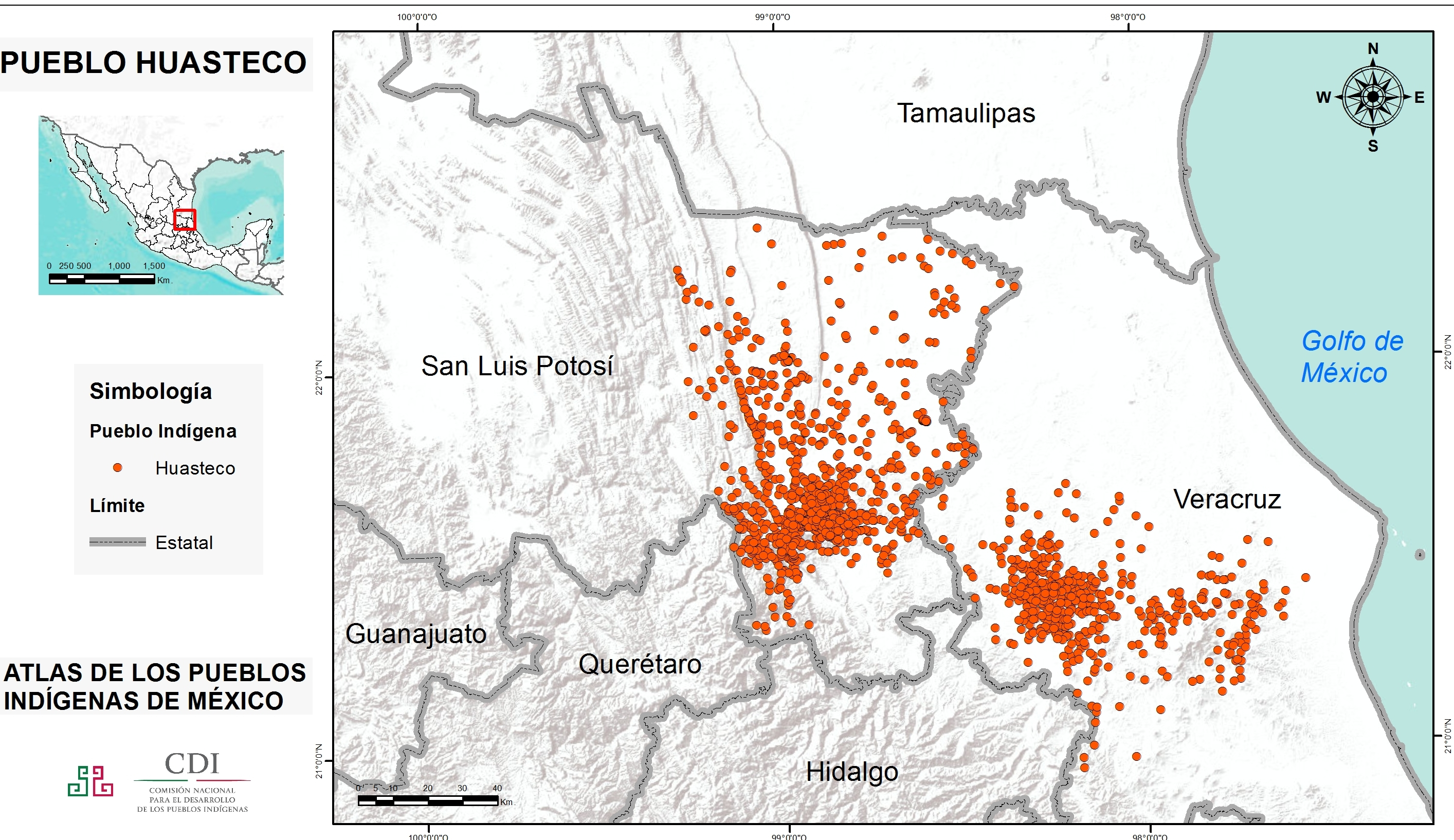 Tantoyuca